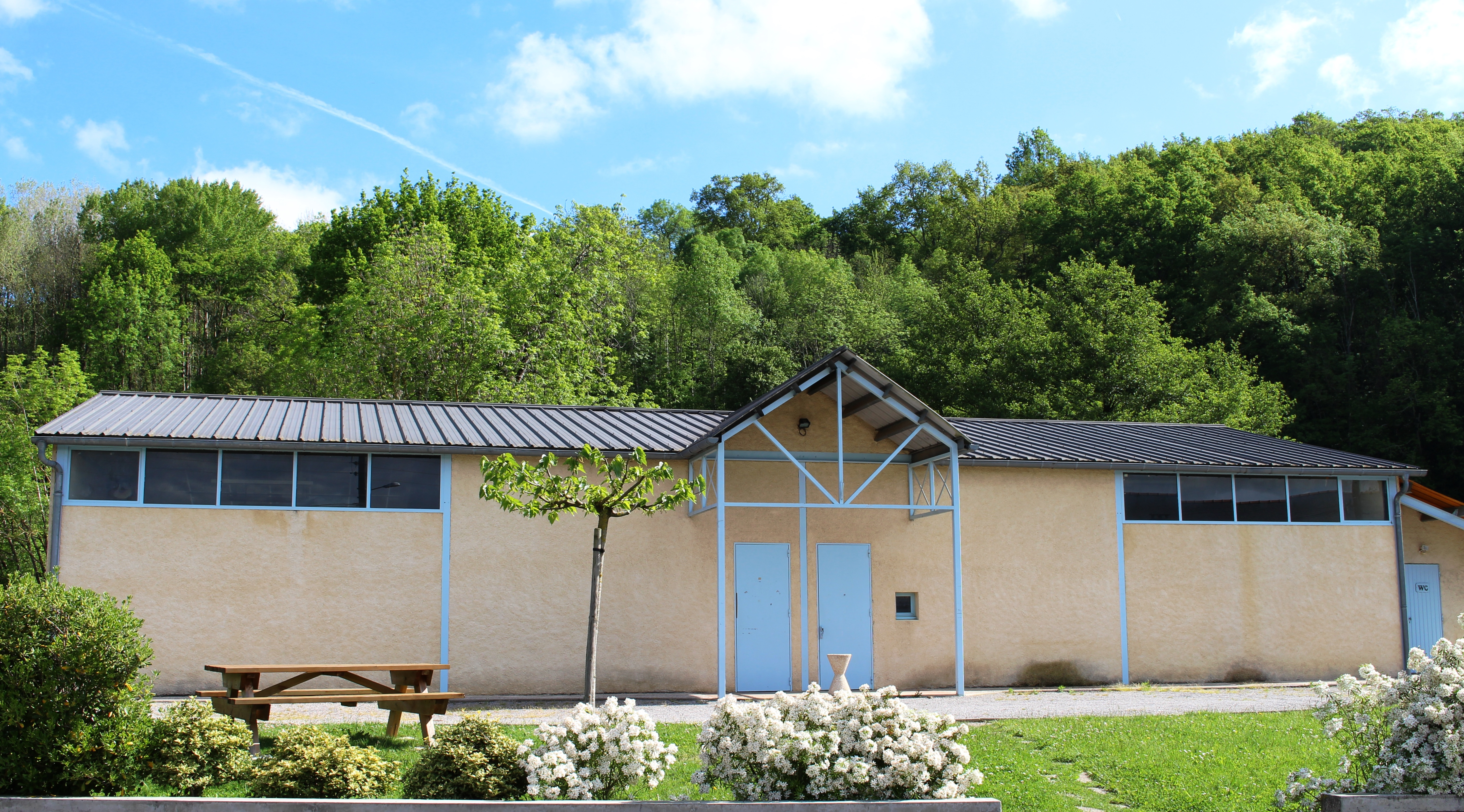 Salle des fêtes de Hibarette (Hautes-Pyrénées)